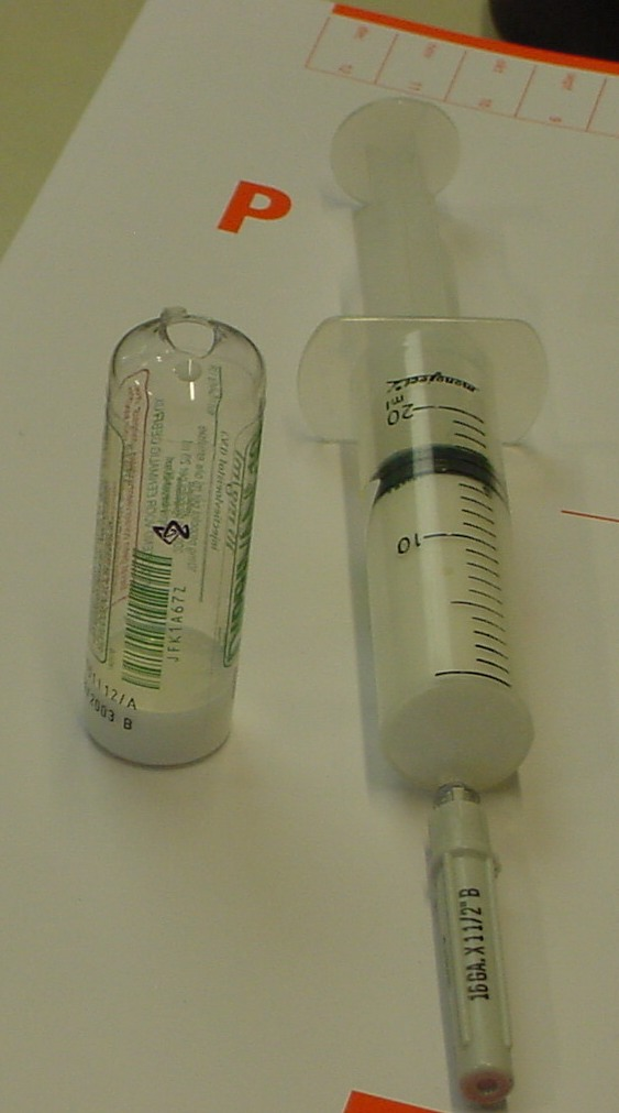 Foto zelf gemaakt, akkoord gebruik op internet